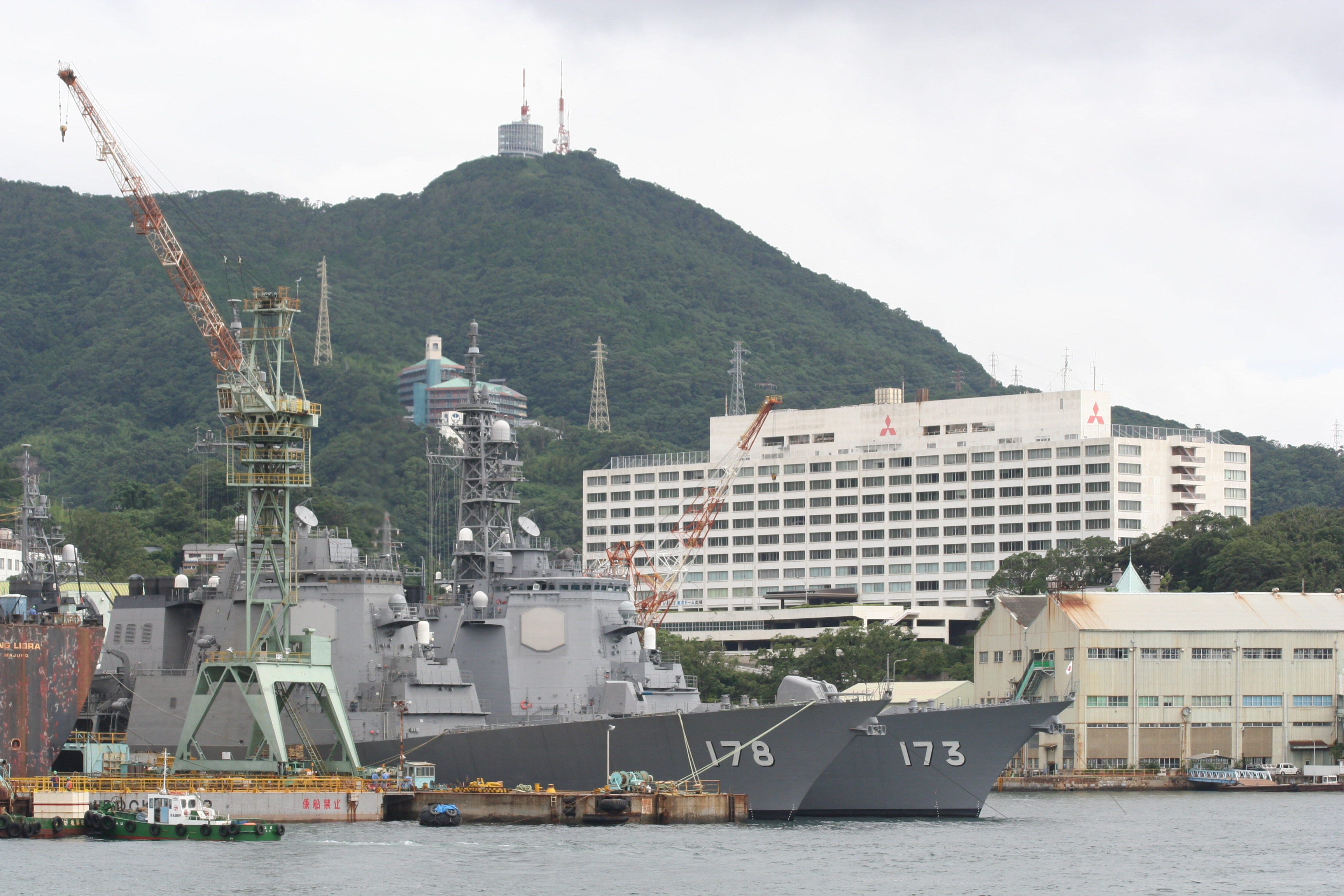 Making Ashigara in Nagasaki. (Next to JDS Kongo DDG-173)